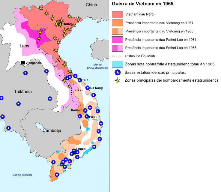 Esquèma de la Guèrra de Vietnam en 1965.